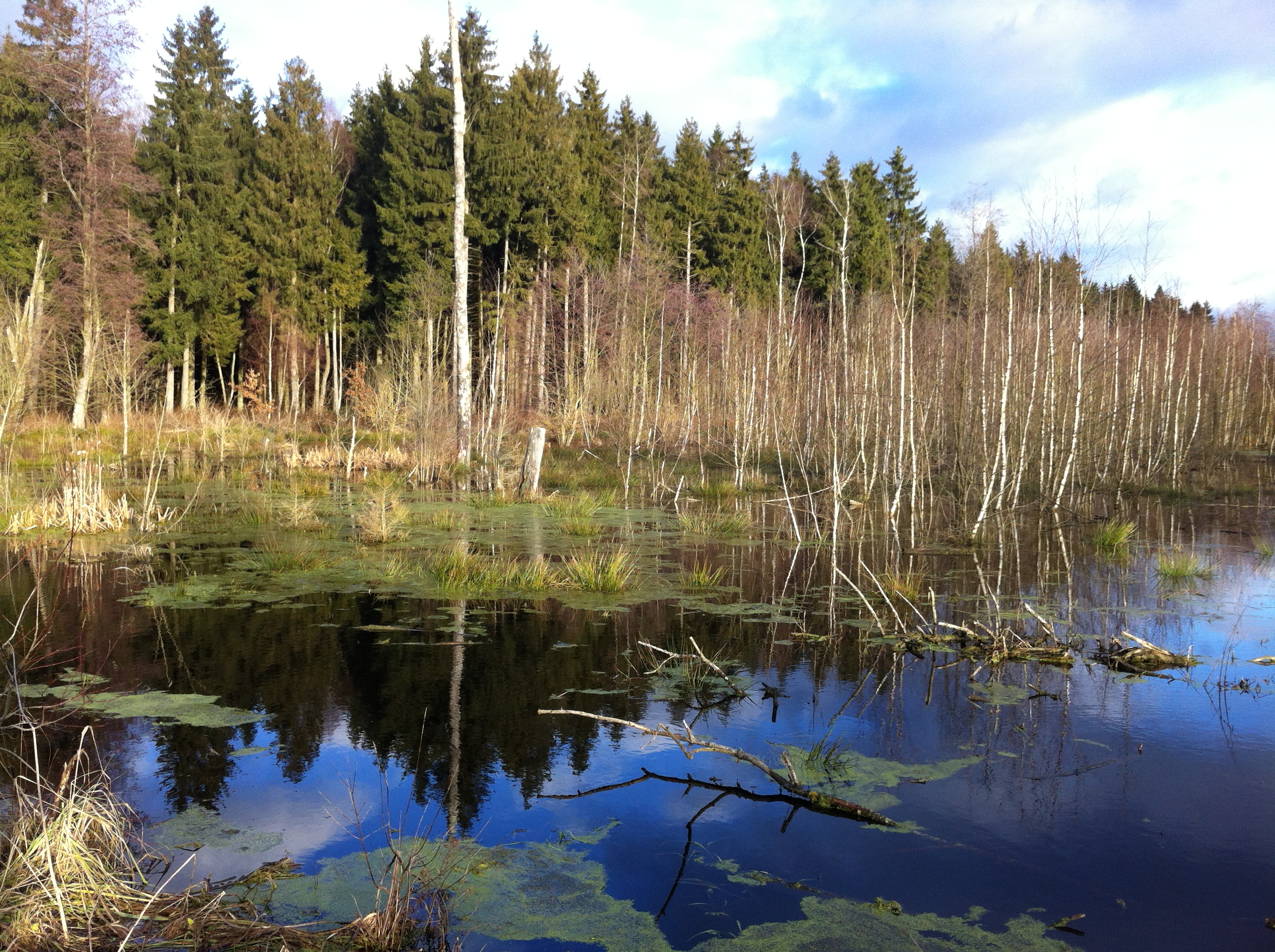 Naturschutzgebiet Haspelmoor (NSG-00250.01), Oberbayern. Das Haspelmoor ist ein Hochmoor-Gebiet, das lange Jahrzehnte industriell zum Torf-Abbau genutzt wurde. Dank sanfter Renaturierungsmaßnahmen bleibt es nun weitgehend sich selbst überlassen Seit einigen Jahren sind Biber aktiv und sorgen für wechselnde Wasserstände.